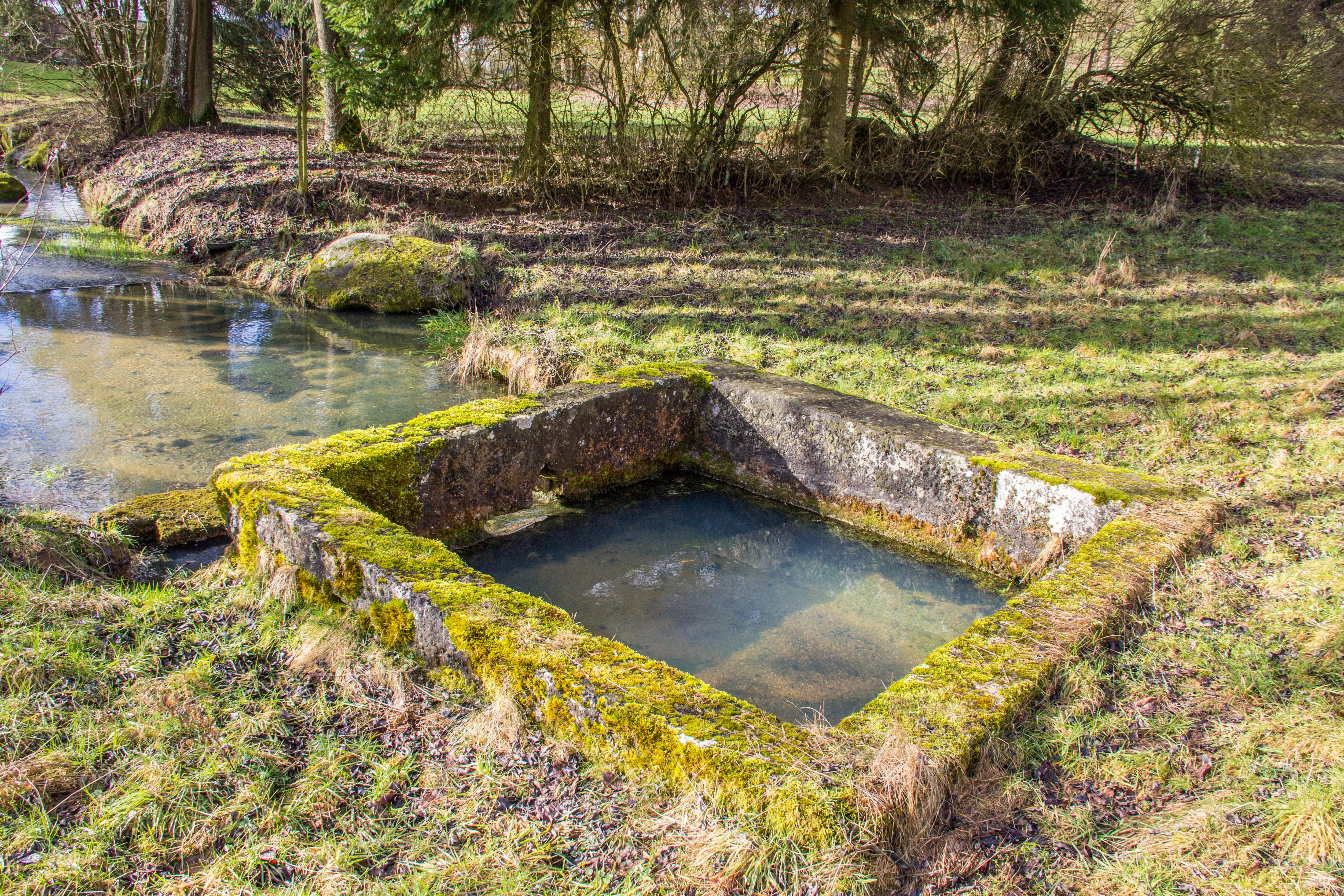 Mühlbachquelle, Steinbachquelle, Steinbach, Neukirchen bei Sulzbach-Rosenberg, Geotop